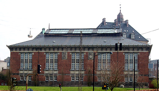 Erhvervsarkivet i Århus , Denmark , tegnet af Hack Kampmann, opført 1898-1902